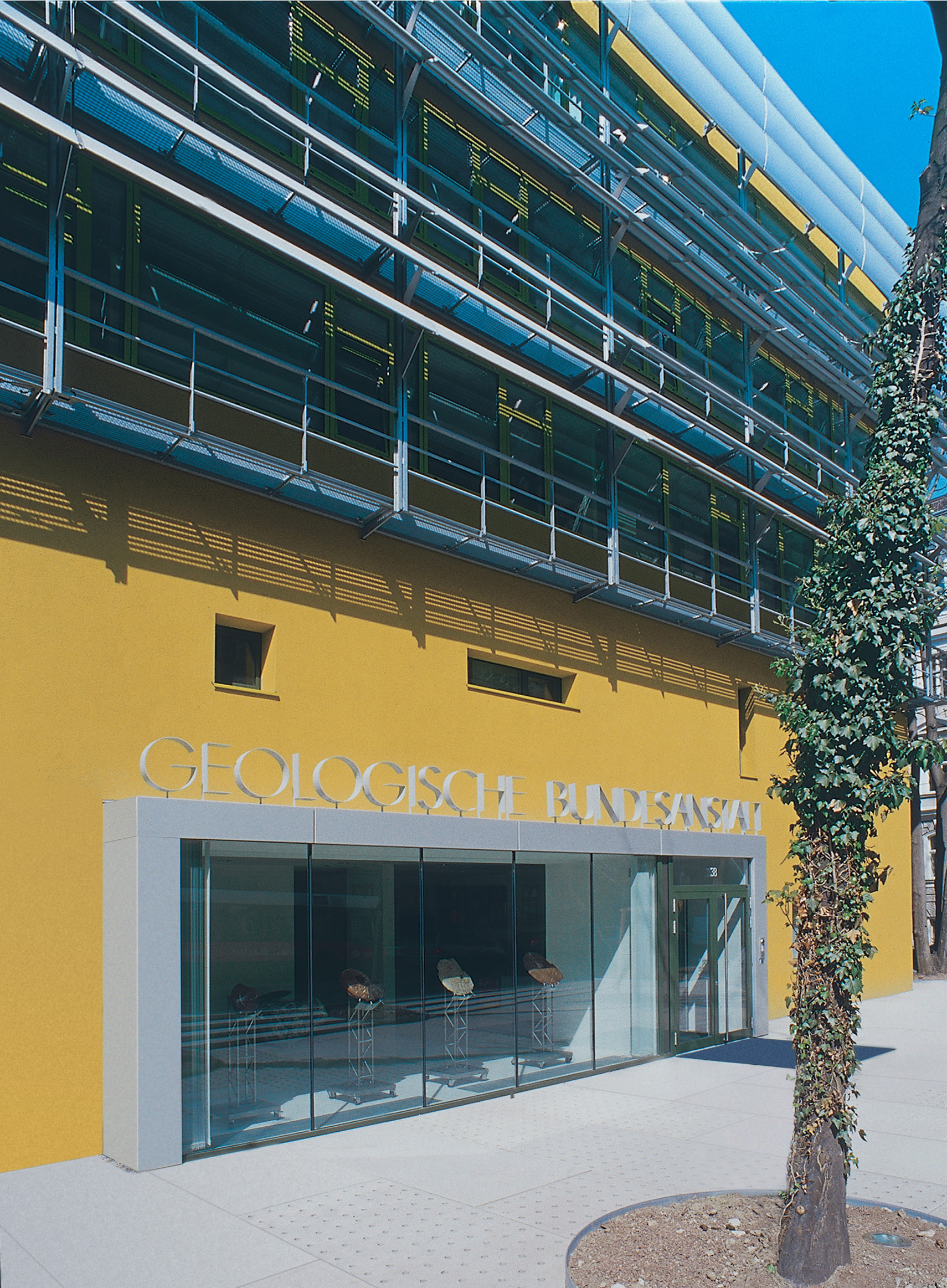 Eingang zur Geologischen Bundesanstalt